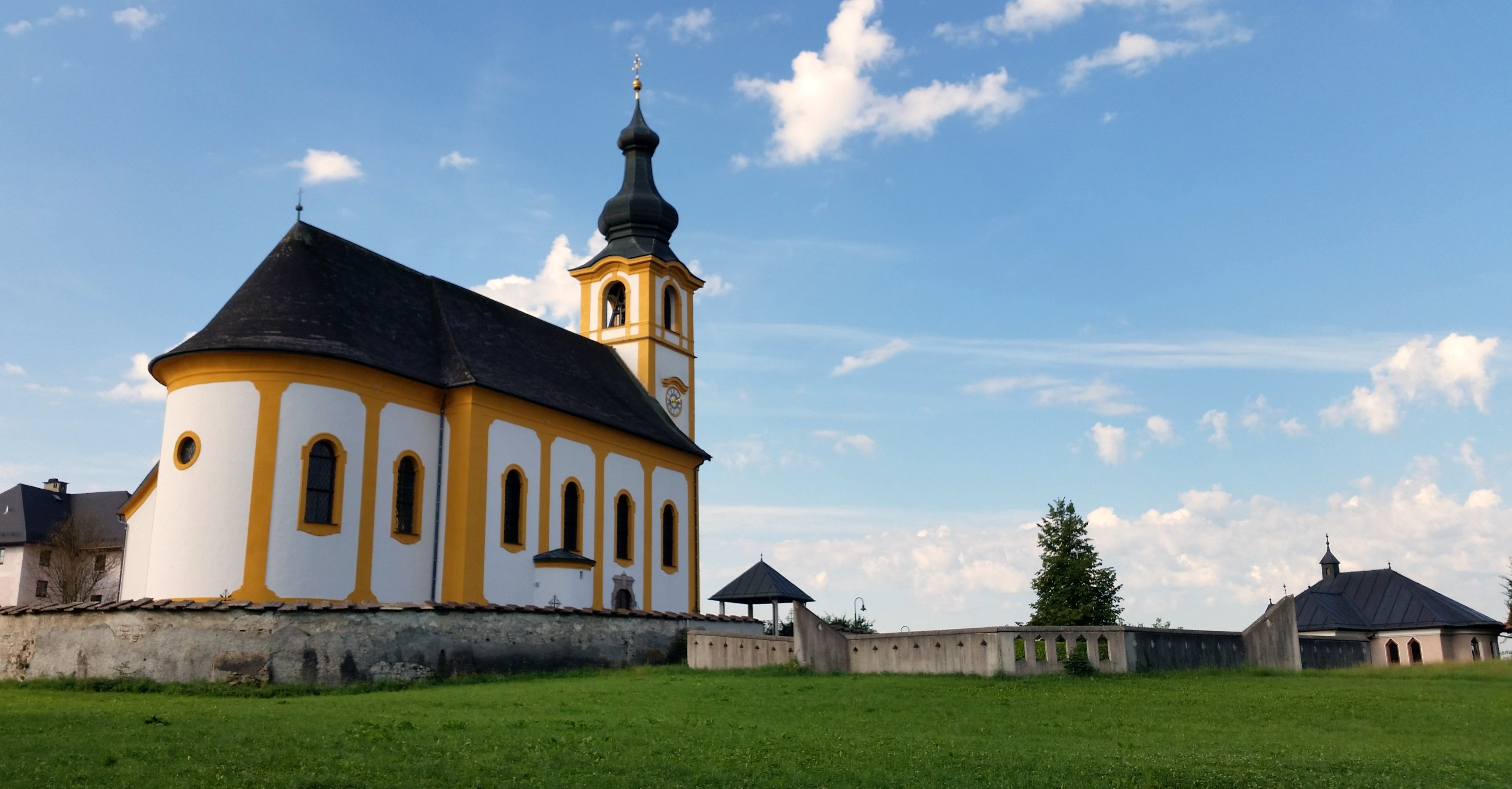 Kath. Pfarrkirche hl. Georg